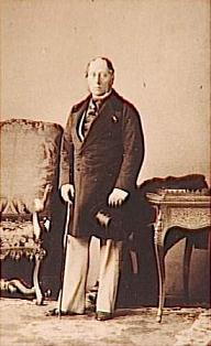 Félix Baciocchi (1803-1866)